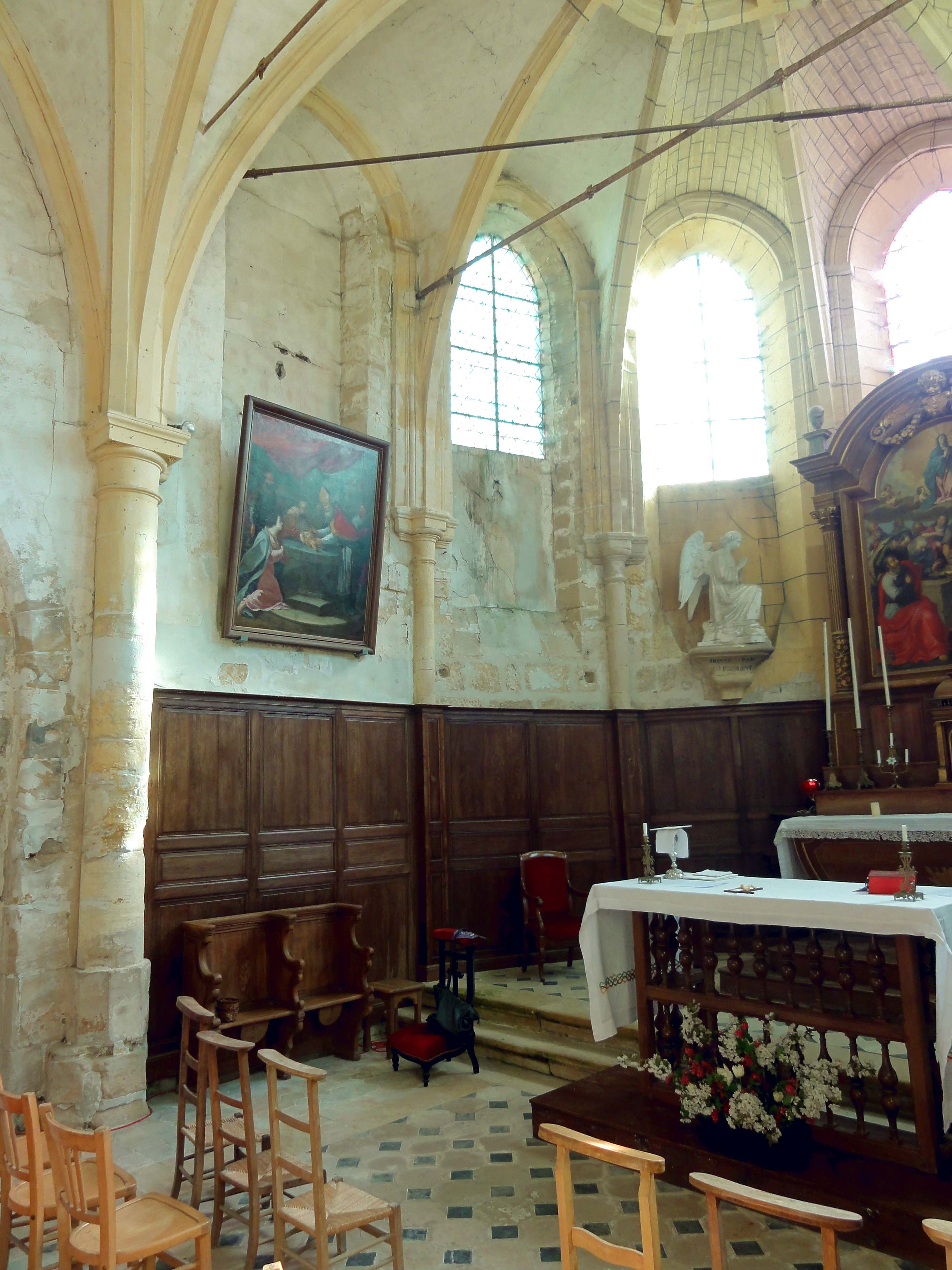 Intérieur de l'église - voir titre.